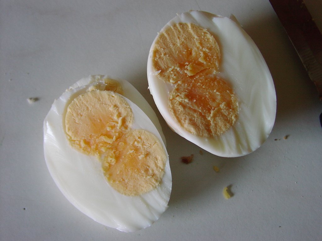 Hardboiled double-yolked eggs